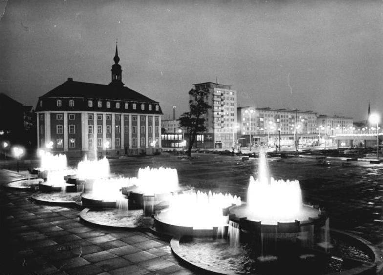 Gera, Platz der Republik, Nacht ADN-ZB Kasper 24.6.82-pe. Gera: Schöne DDR. Abendstimmung am Platz der Republik